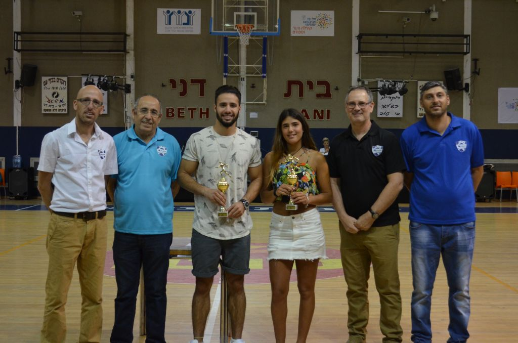 במרכז רתם אשכנזי, טניס, ספורטאית השנה 2015 ואסף סמואל, כדורסל, ספורטאי השנה 2014.